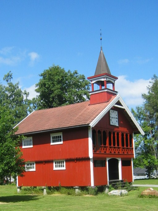 Stabbur, Orkdal videregåande skole